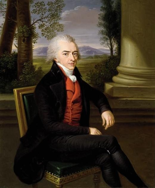 «Гуттенбрунн Людвиг / Портрет А.К. Разумовского.»